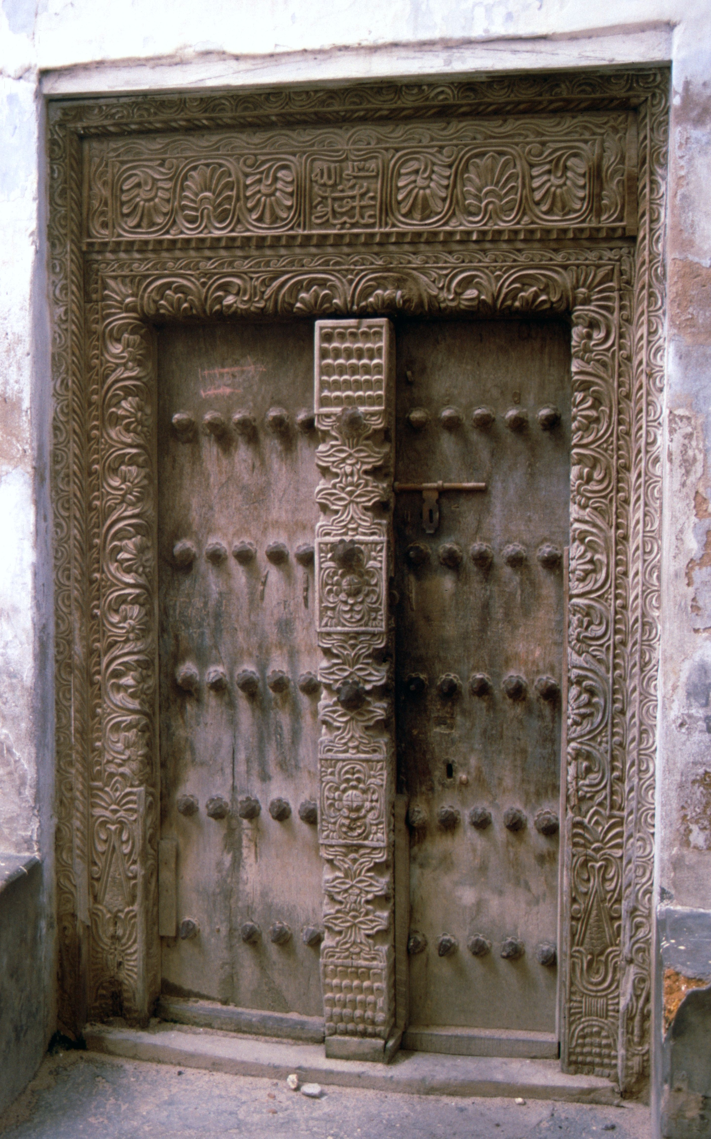 Tor eines arabischen Hauses in Sansibar.